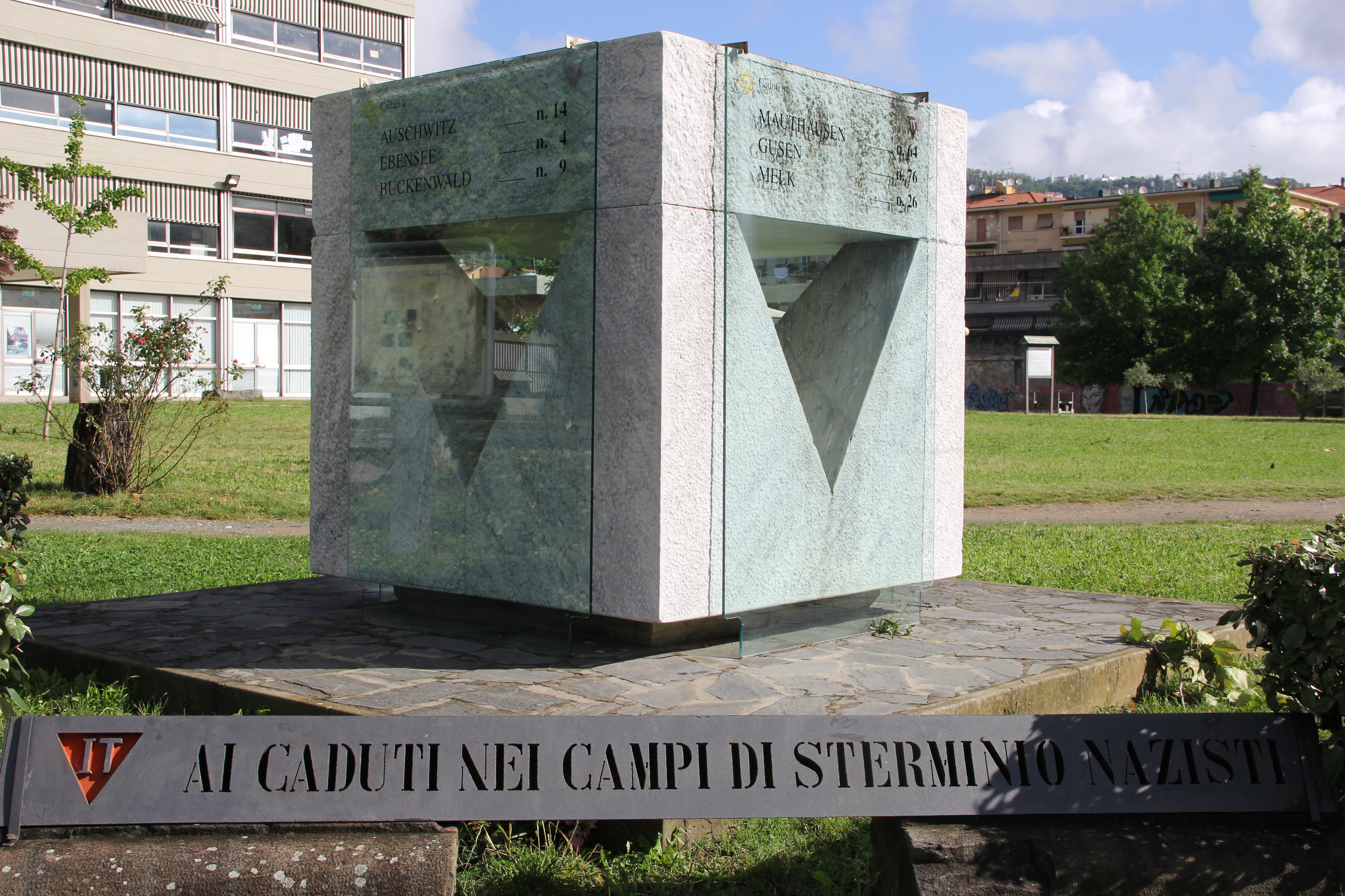 Monumento in marmo e vetro posto all'interno del parco del complesso scolastico "2 Giugno" alla Spezia. L'opera riporta sulle quattro facciate i nomi dei campi di sterminio in cui affluirono i deportati spezzini che furono torturati nella "Caserma XXI° Reggimento di Fanteria".